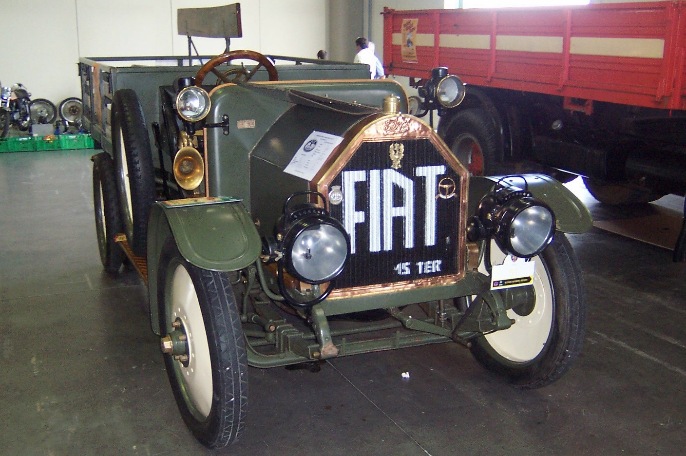 FIAT 15 Ter (1911-1920) in allestimento VTT, 4 cilindri in linea, 4.398 cm3, anche detto "FIAT Libia" come la precedente serie "15 Bis".